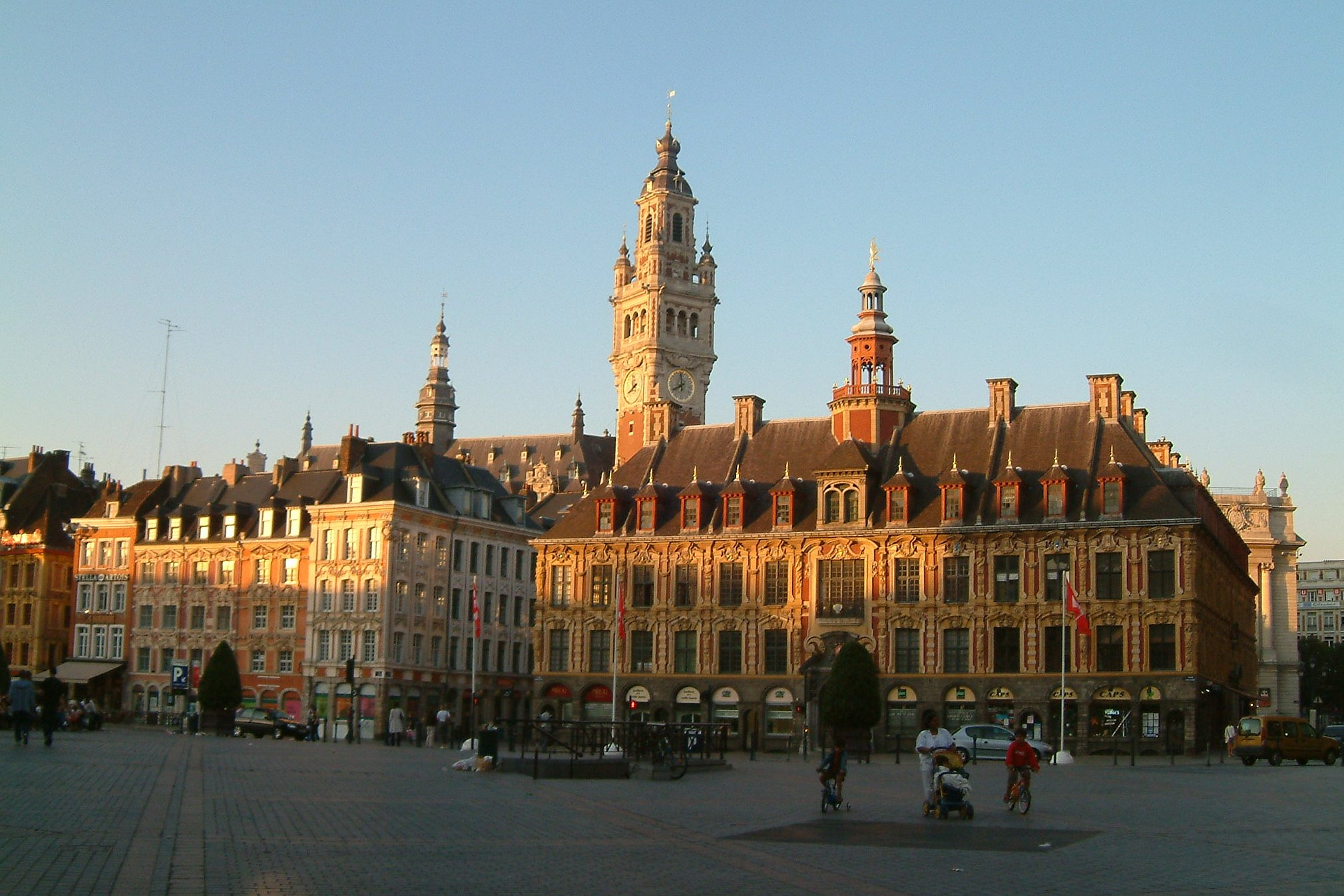 Grande place, Lille, FRANCE. Au premier plan, la vieille bourse. En arrière plan, le beffroi de la chambre de commerce